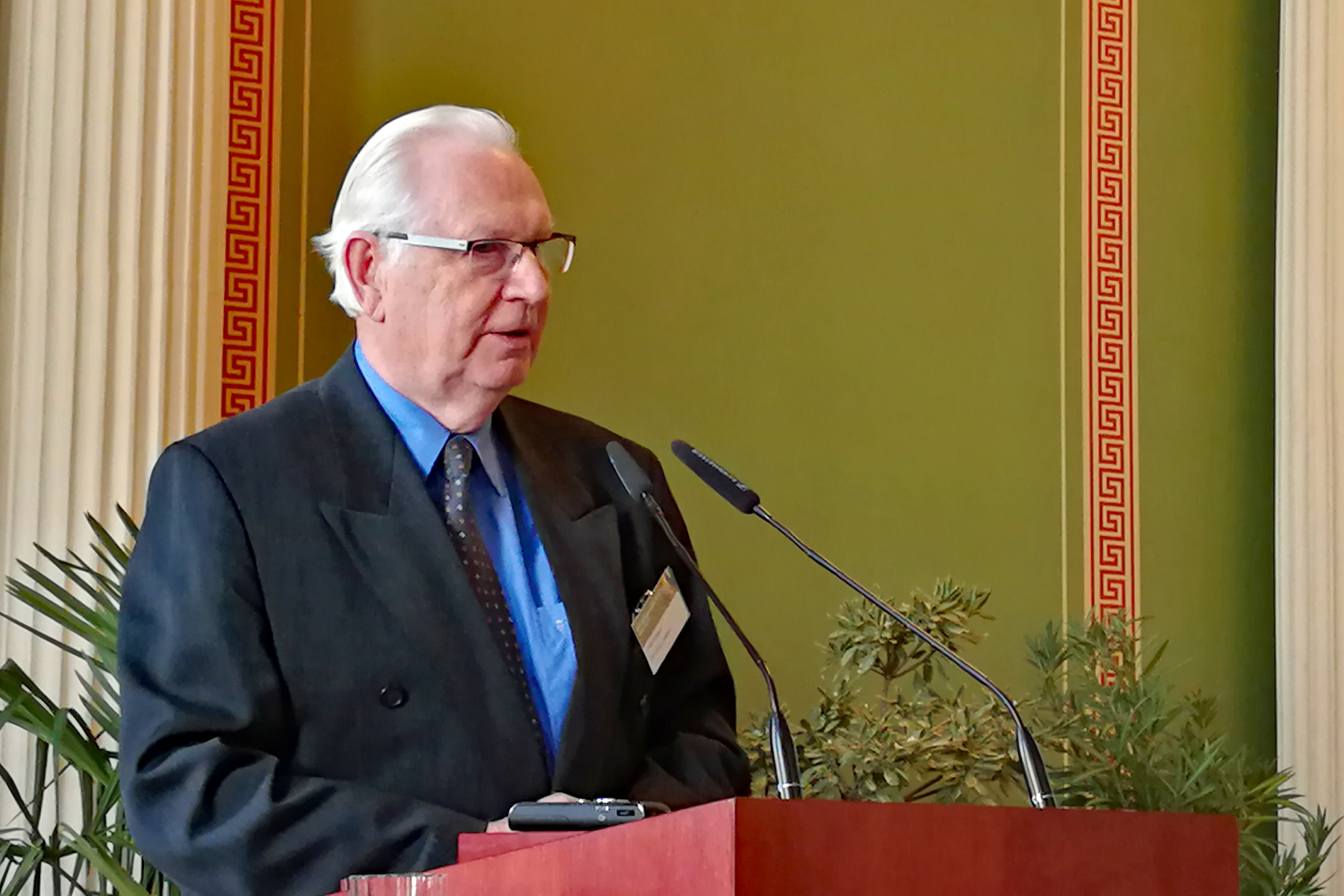 Verleihung der Escherich-Medaille an Fred Klingauf bei der Entomologentagung der Deutschen Gesellschaft für allgemeine und angewandte Entomologie 2019 in Halle an der Saale